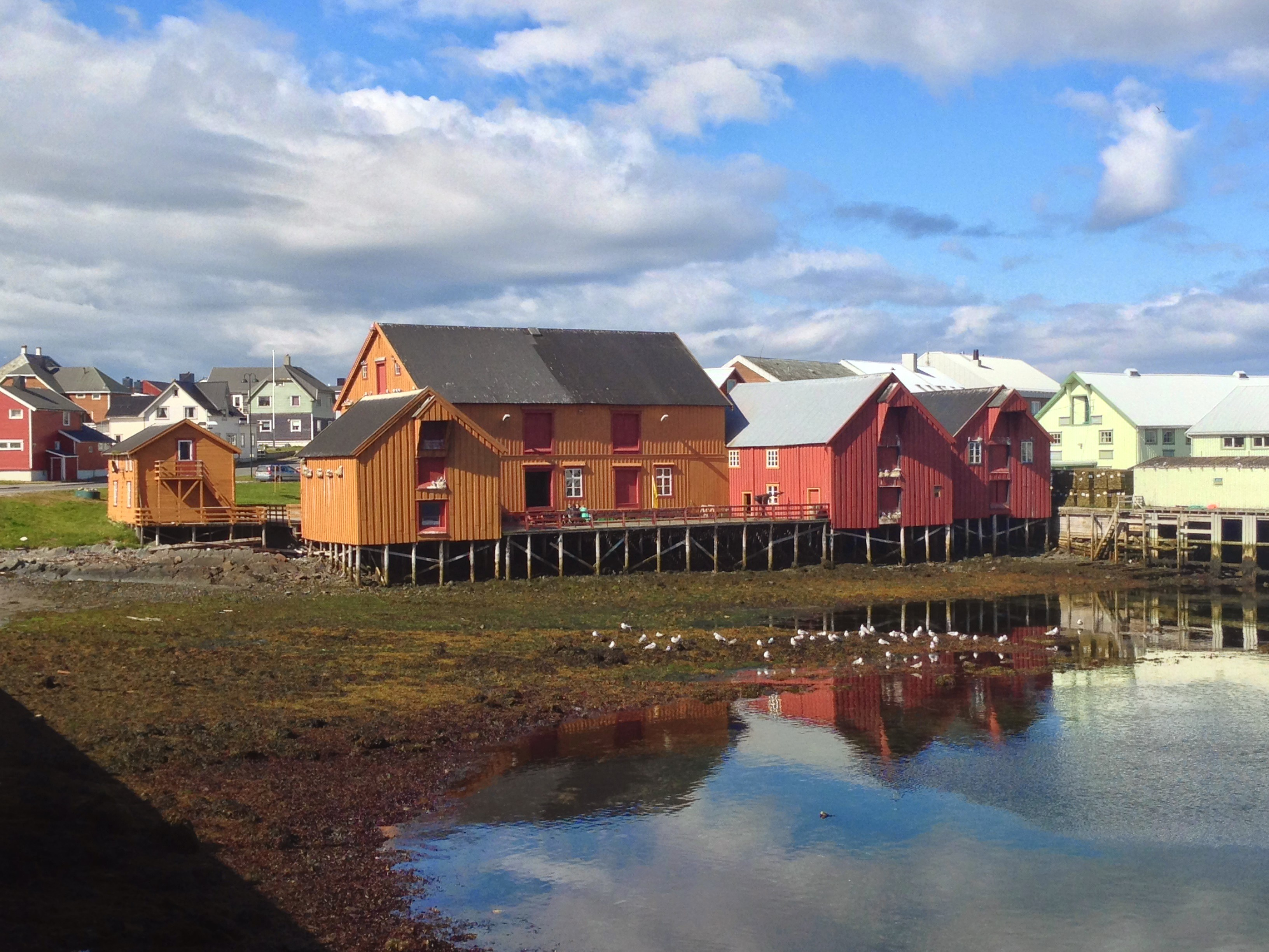 Pomormuseet holder til i Brodtkorbsjåene i Vardø, som er blant den eldste bevarte trebebyggelsen i Finnmark